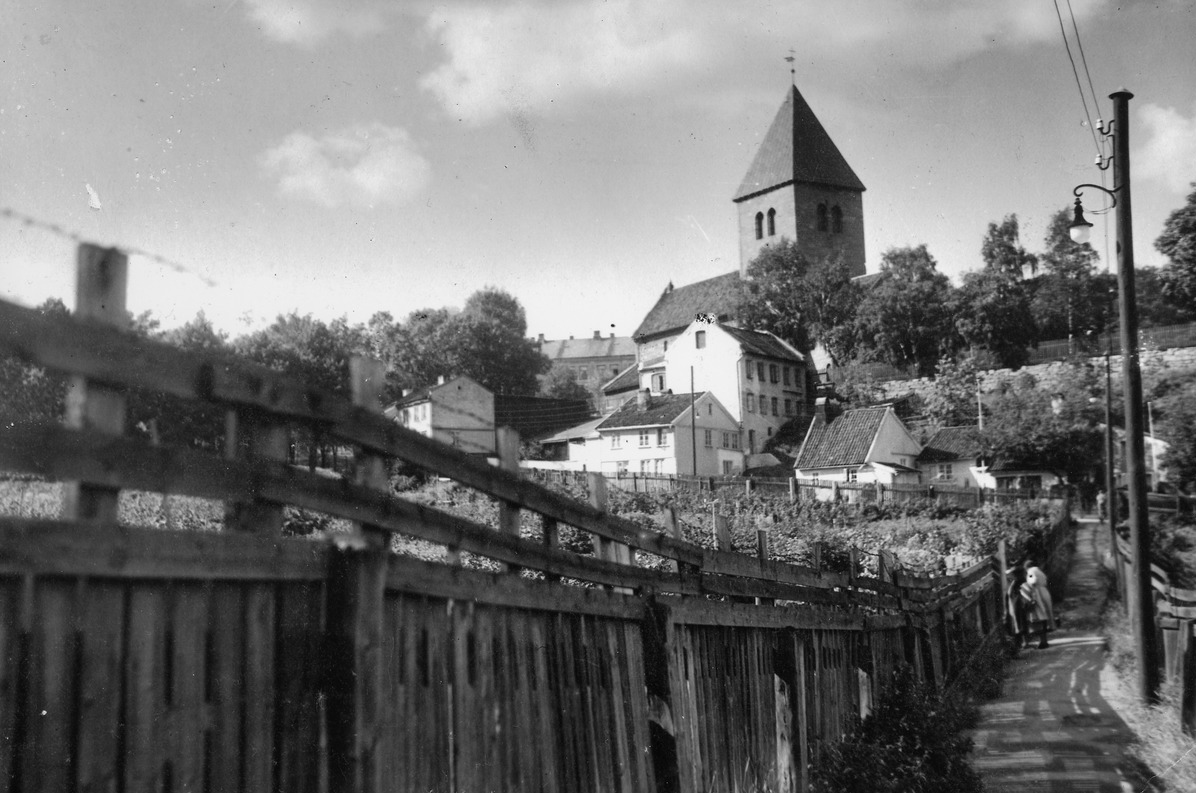 Kjærlighetsstien ned fra Telthusbakken, ca. 1930. Foto: Sverre Sørum / Oslo Museum.